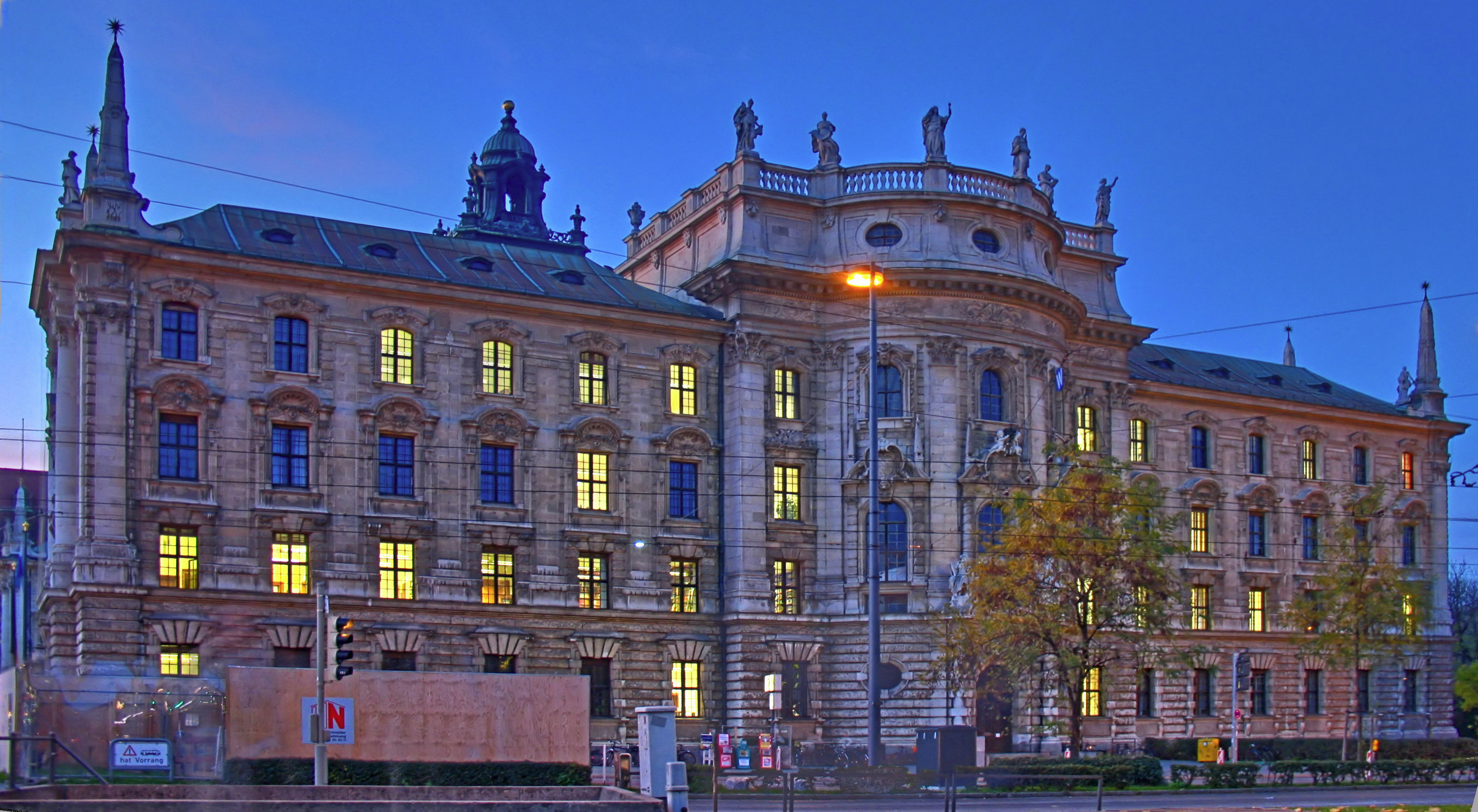 Germany, Bavaria, Munich, Justizpalast, nördlich vom Stachus (HDR-Aufnahme)